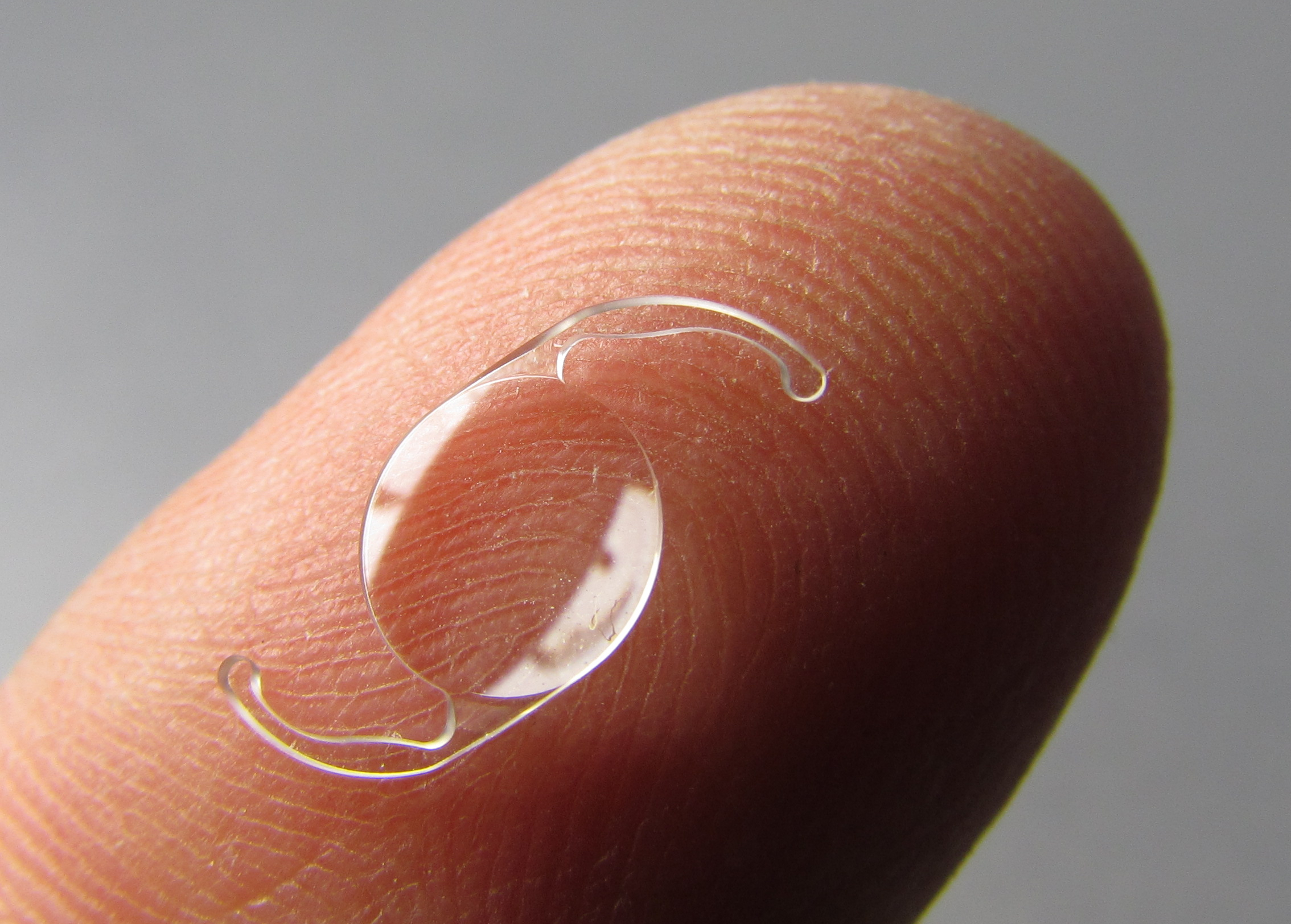 Bildinhalt: Hinterkammerlinse (18,5 Dioptrien, Gesamtlänge 13 mm, Durchmesser 6,0 mm) auf Zeigefinderkuppe vor grauem Hintergrund Aufnahmeort: Baden-Baden, Deutschland